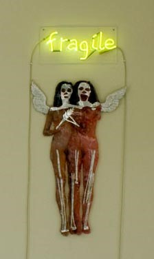 Installation mit Neon, Wien 2014